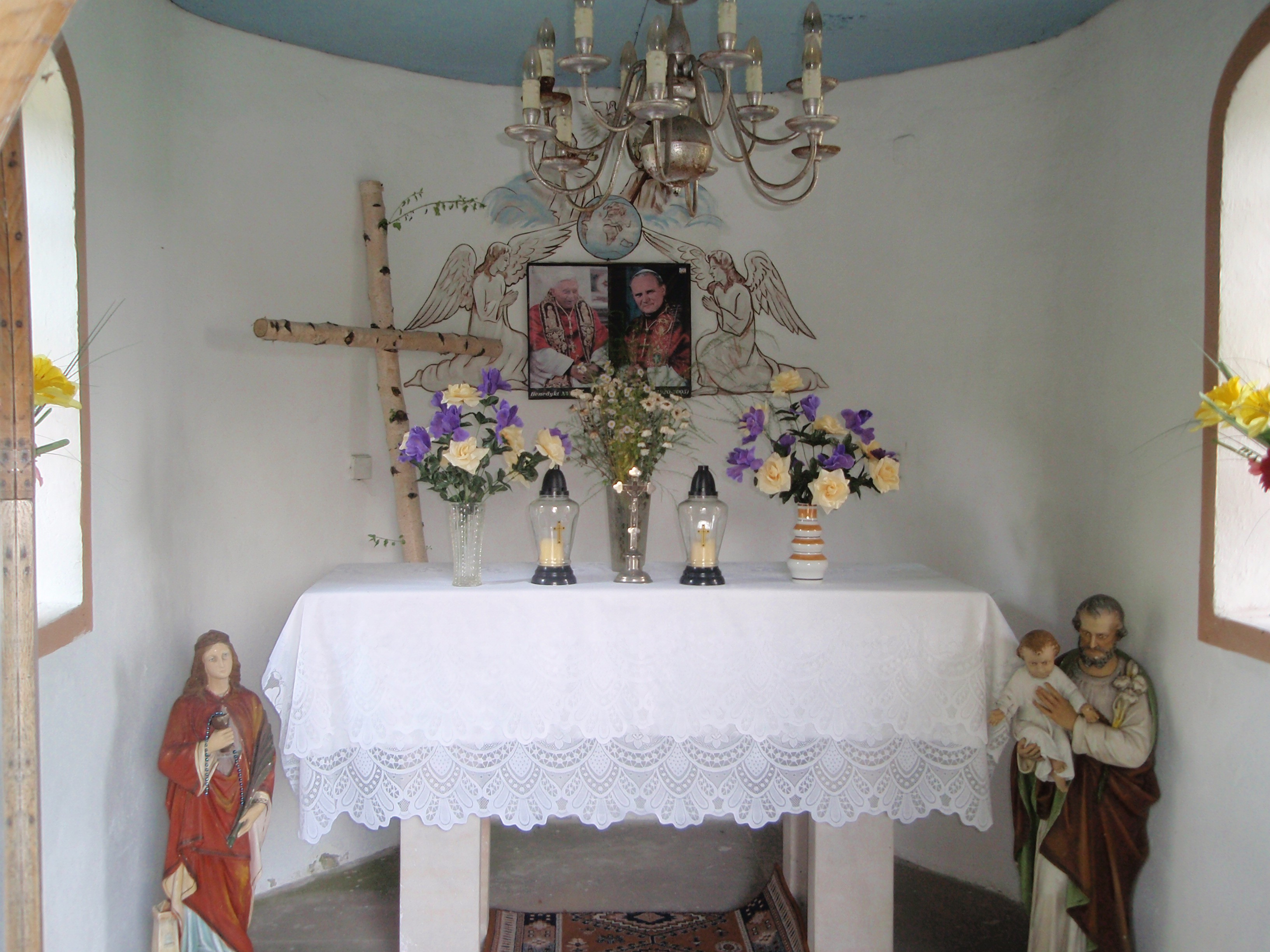 Wnętrze kapliczki w Dąbrowie Górniczej-Błędowie (woj. śląskie)